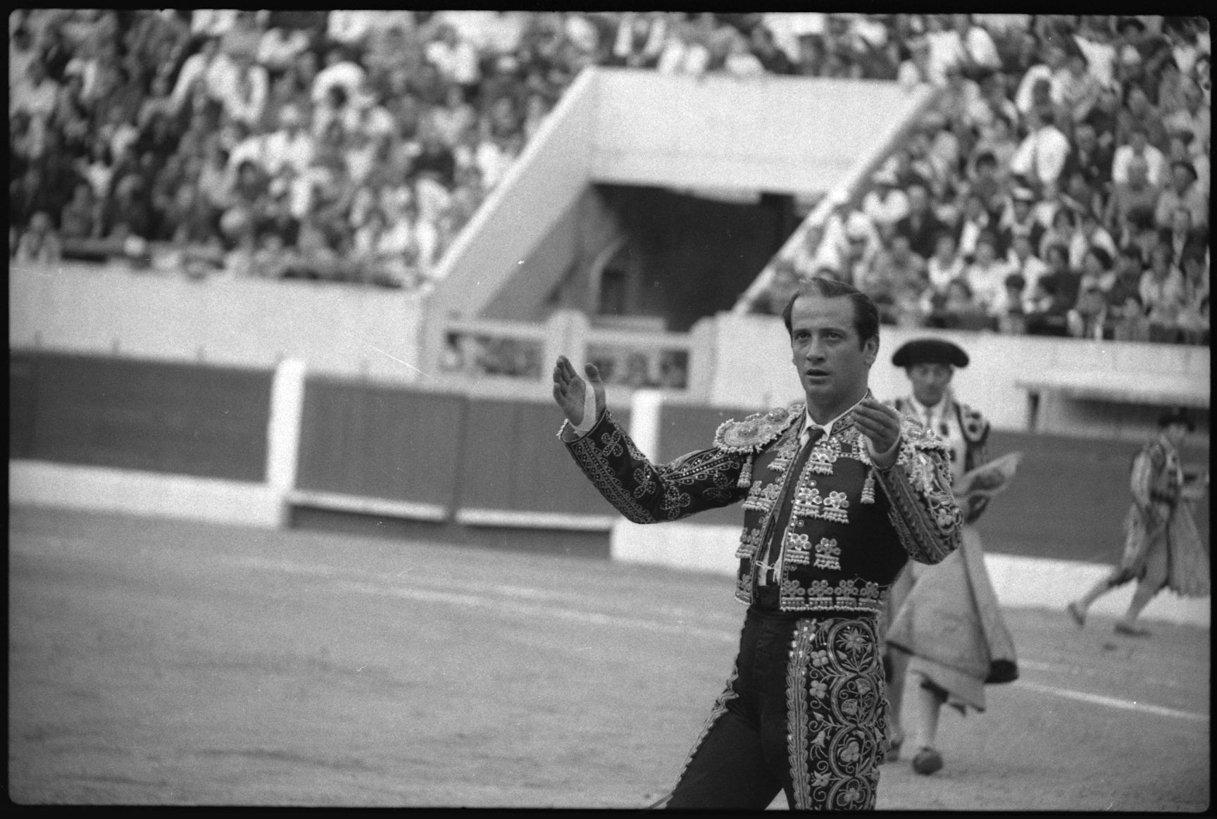 Les arènes de Toulouse. 18 Septembre 1966. Vue de la corrida d'Antonete dans les arènes de Toulouse.